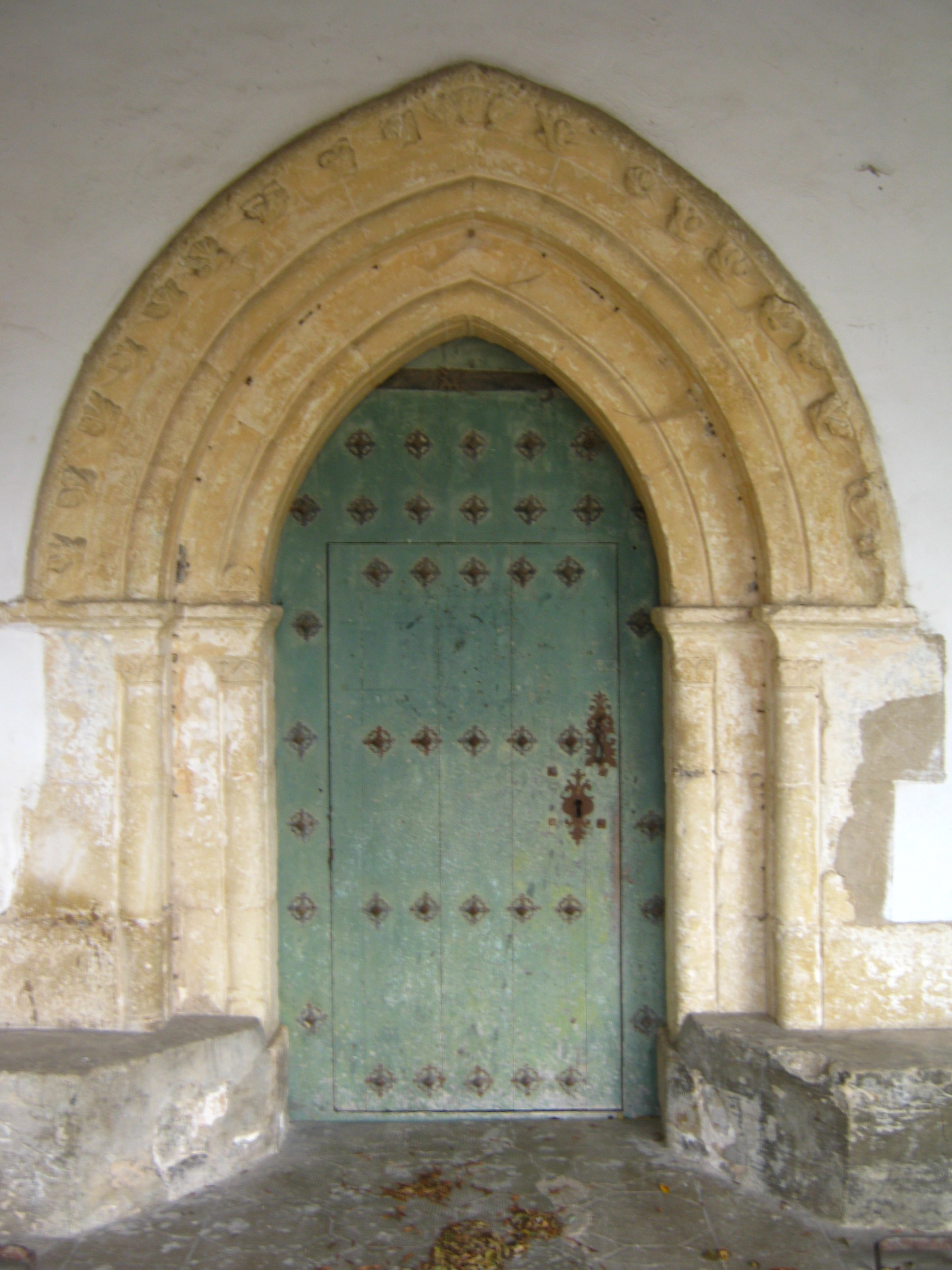 Portada de la iglesia de Lubiano (Álava, España)